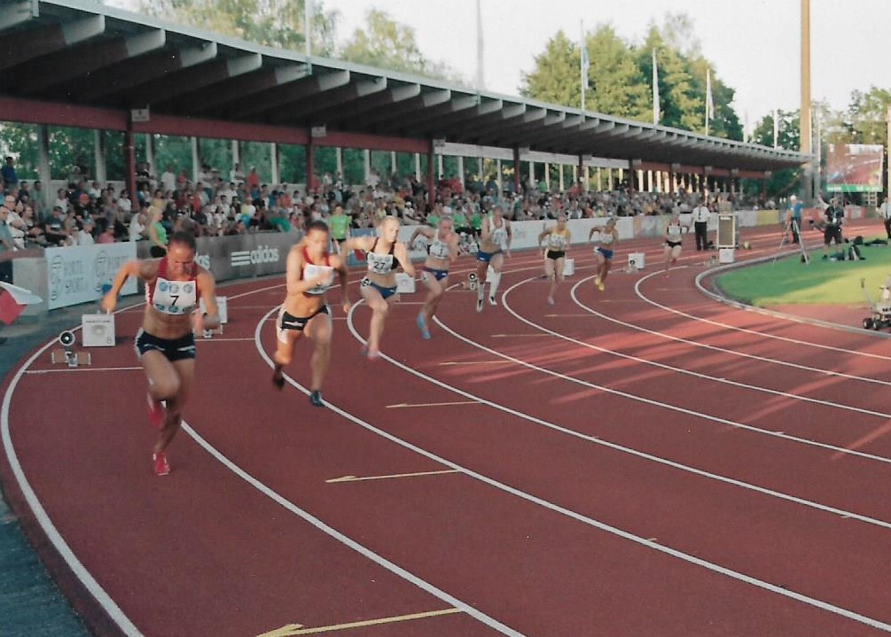 Naisten 200 metrin juoksun loppukilpailun lähtö Kalevan kisoissa 2. elokuuta 2014. Voittaja Hanna-Maari Latvala neljäs vasemmalta ja hopeamitalisti Milja Thureson kolmas vasemmalta.